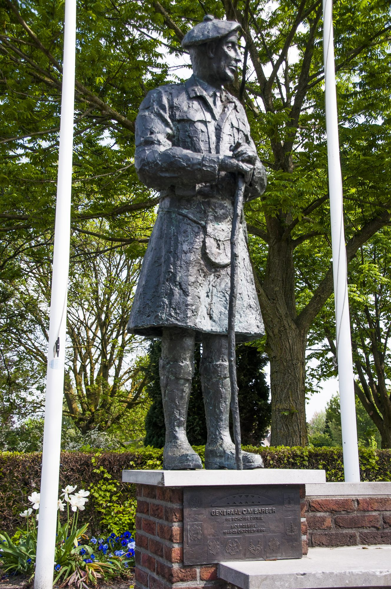 oorlogsstandbeeld Generaal Barber, Raadhuisstraat Oisterwijk/Moergestel